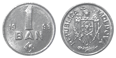 1 Ban - Moldova